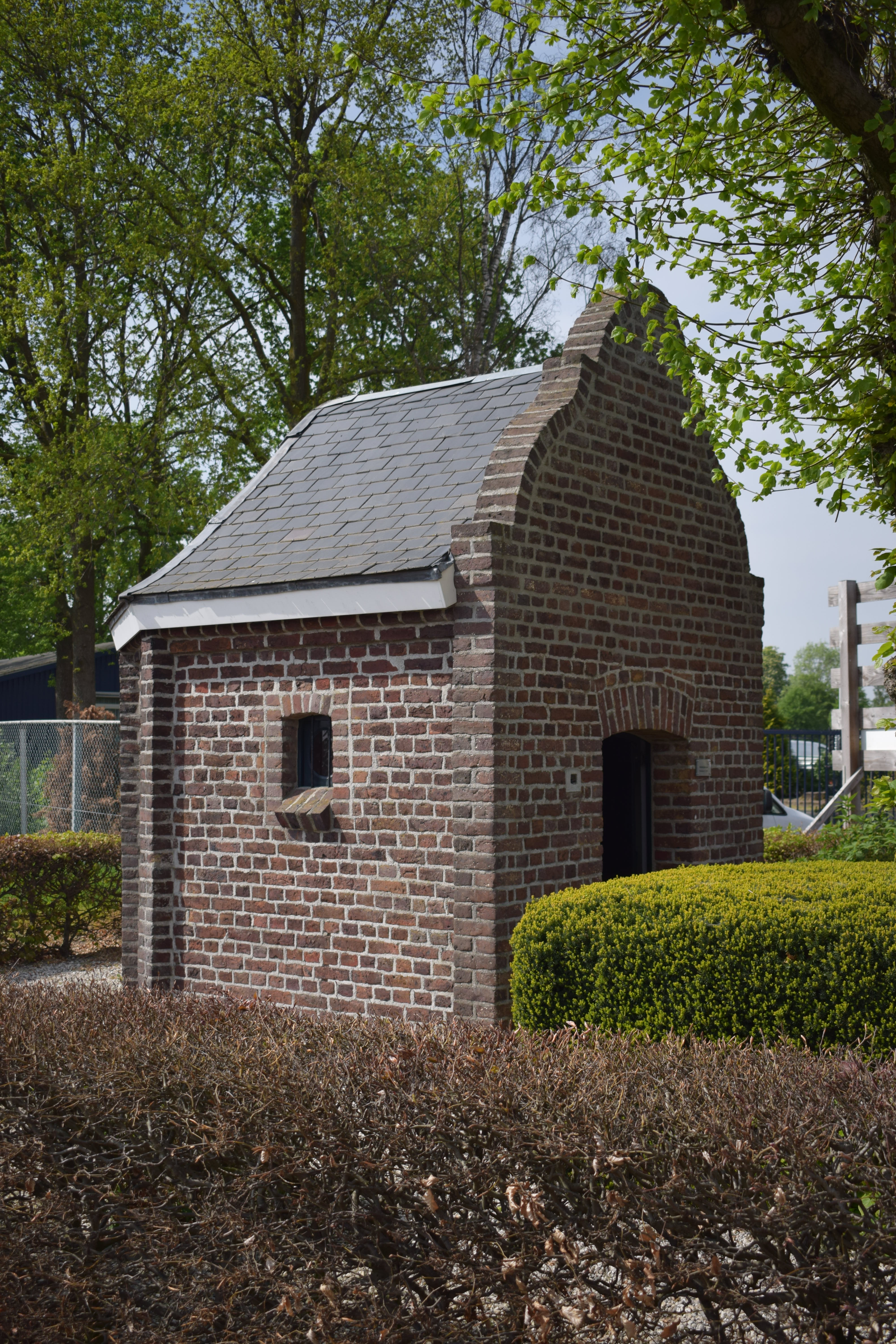 Antonius van Paduakapel, Oude Heldenseweg (Maasbree)